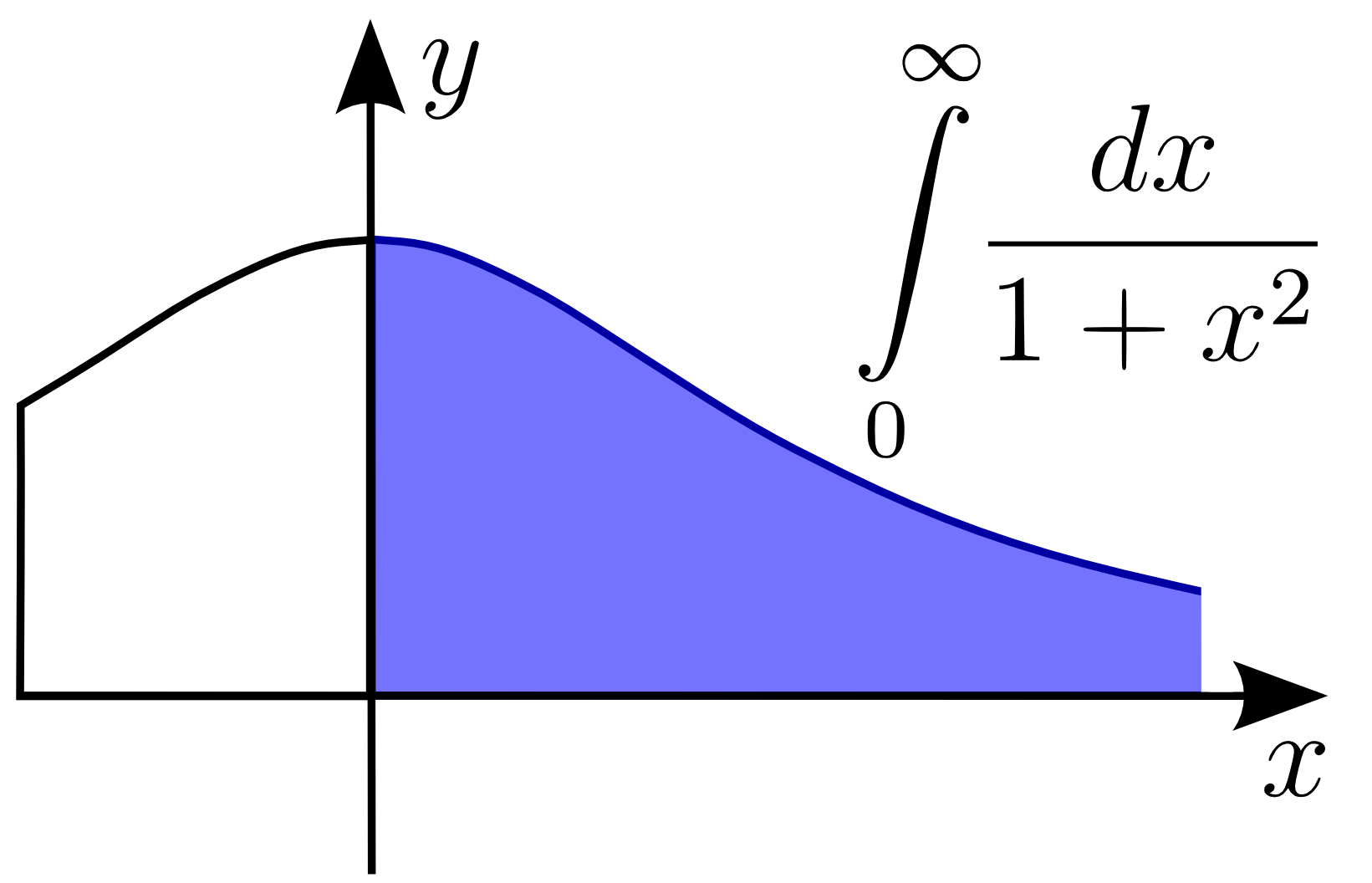 Own work.